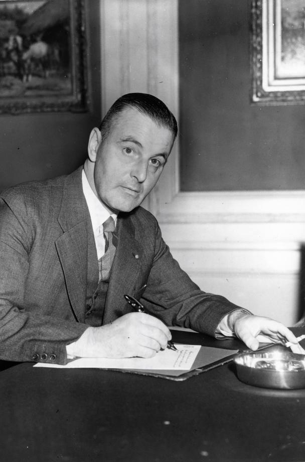 Majoor J.J. Fens (KVP), genoemd als Minister van Oorlog. Nederland, 12 oktober 1950.